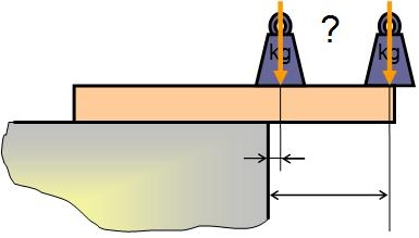 Schéma d'introduction à la notion de moment de force. Réalisé avec le module graphique de Word.